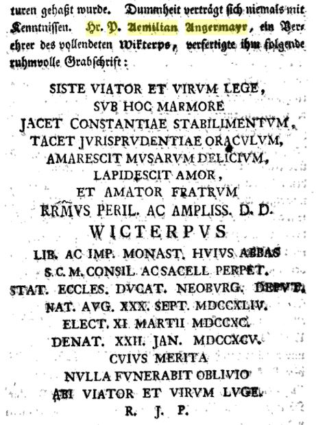 Grabinschrift für Abt Wikterp Grundtner (1744-1795), Abt des Klosters St. Ulrich und Afra in Augsburg, verfasst von Pater Aemilian Angermayr.